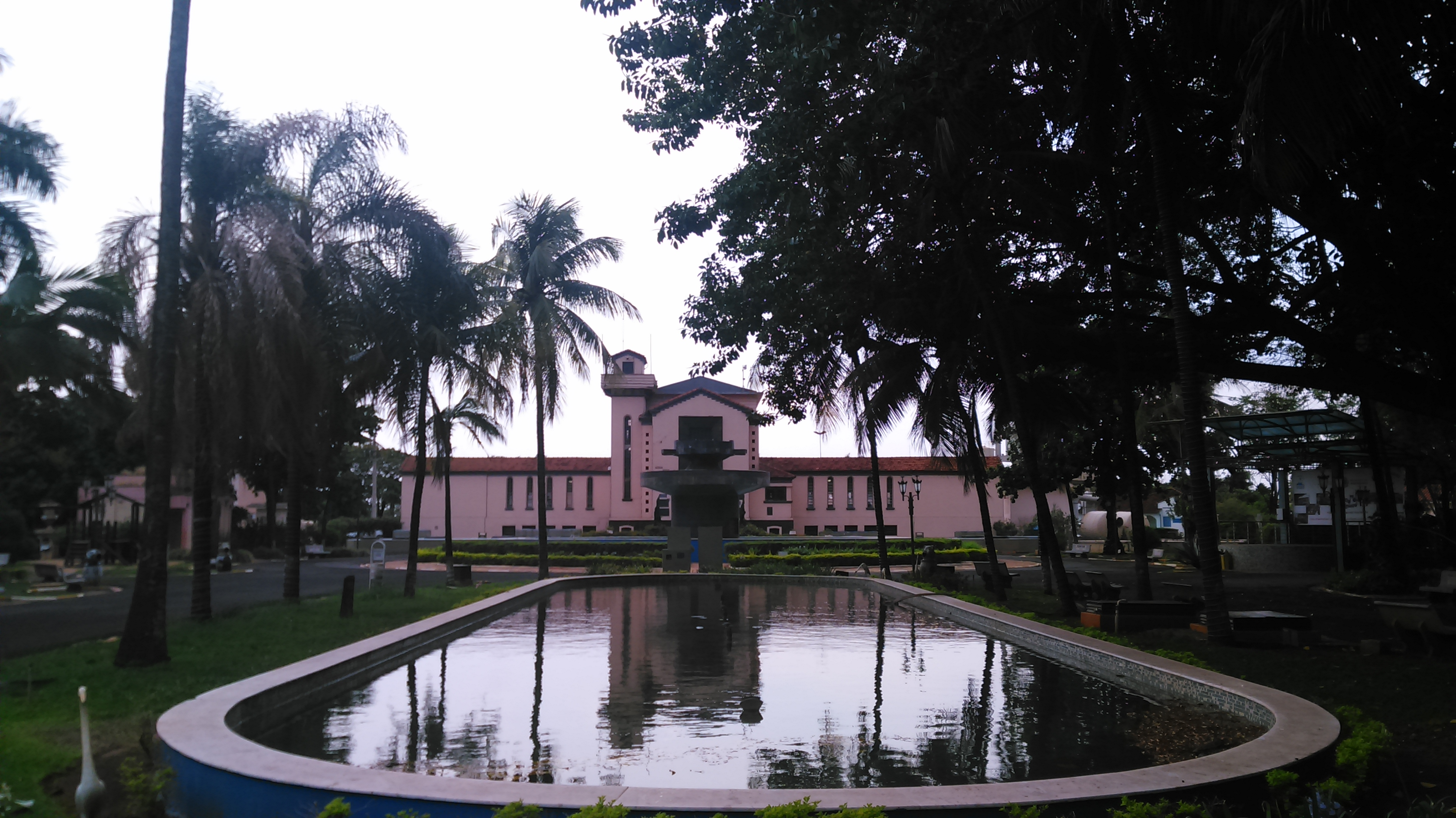 Praça do Daae